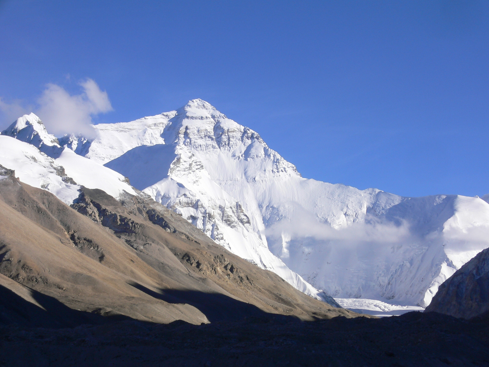 珠穆朗玛峰 Everest